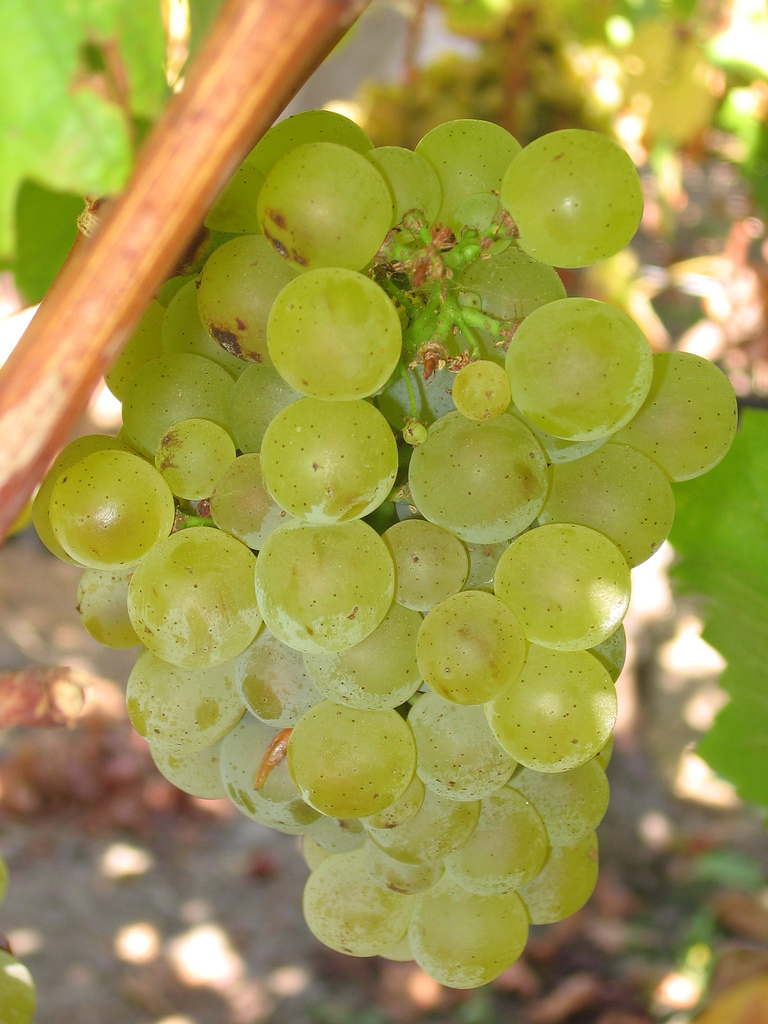 Ripe Sauvignon blanc grapes.